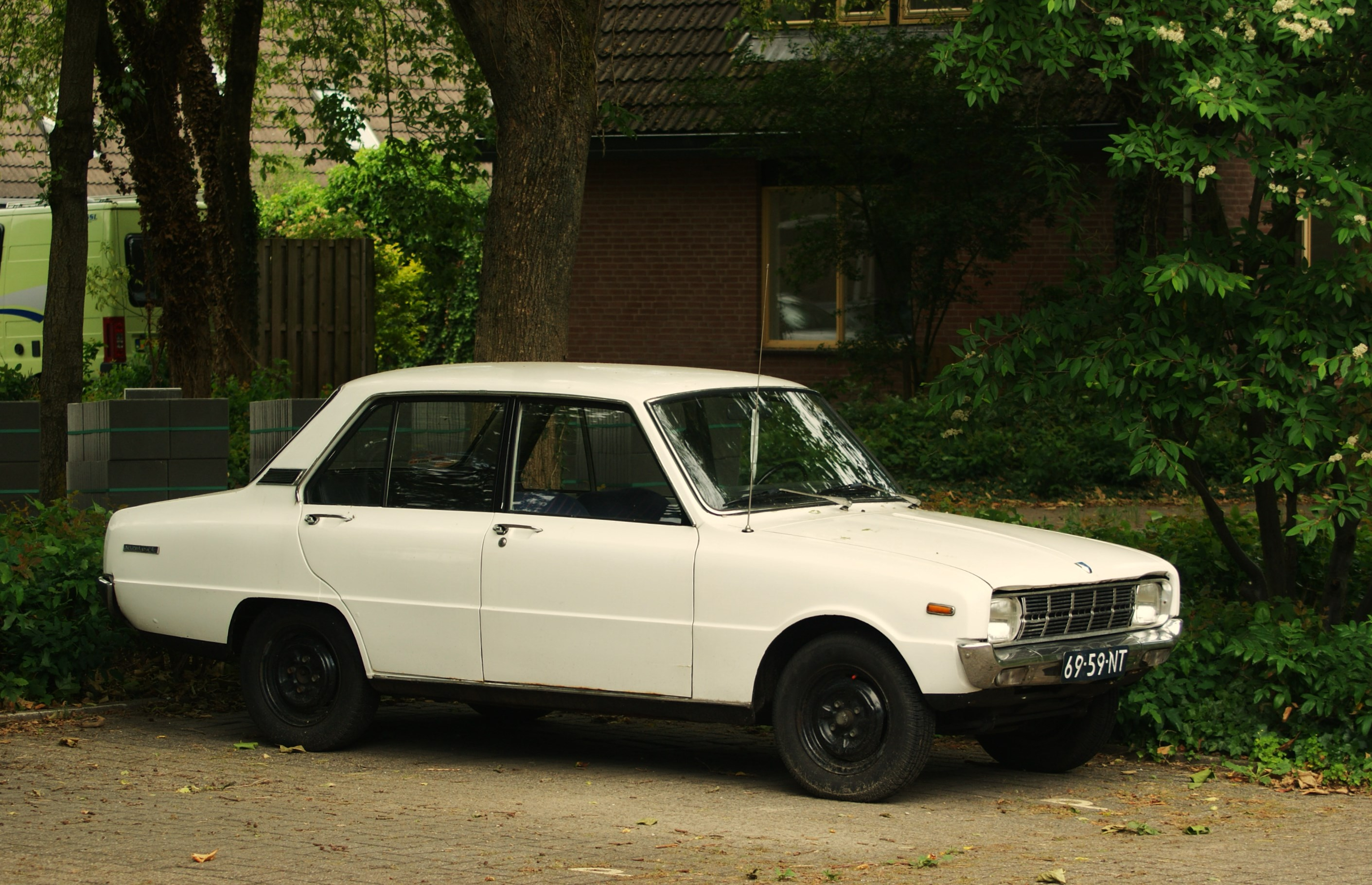 69-59-NT